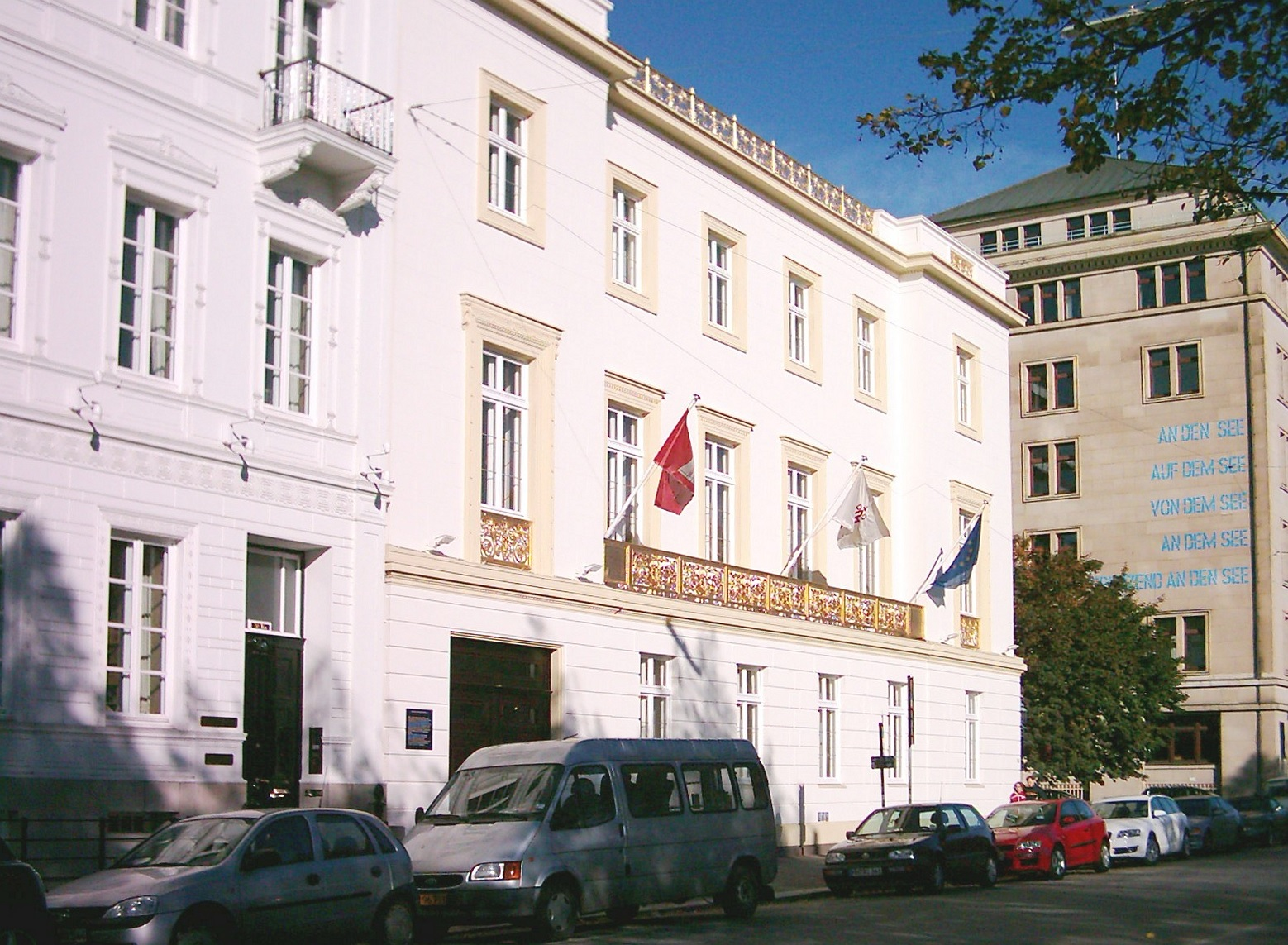 Patrizierhaus am Neuen Jungfernstieg 19 in Hamburg-Neustadt. 1831 - 33 von Franz Gustav Joachim Forsmannfür den Hamburger Bankier Gottlieb Jenisch erbaut, restauriert 1967 - 1970.